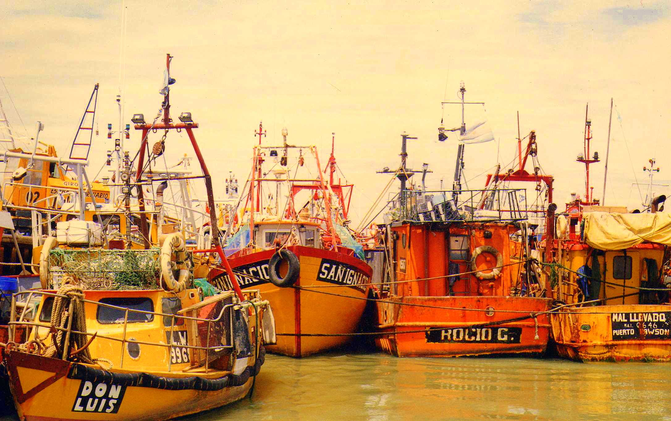 Flota pesquerea, Puerto Playa Unión, Chubut, Argentina